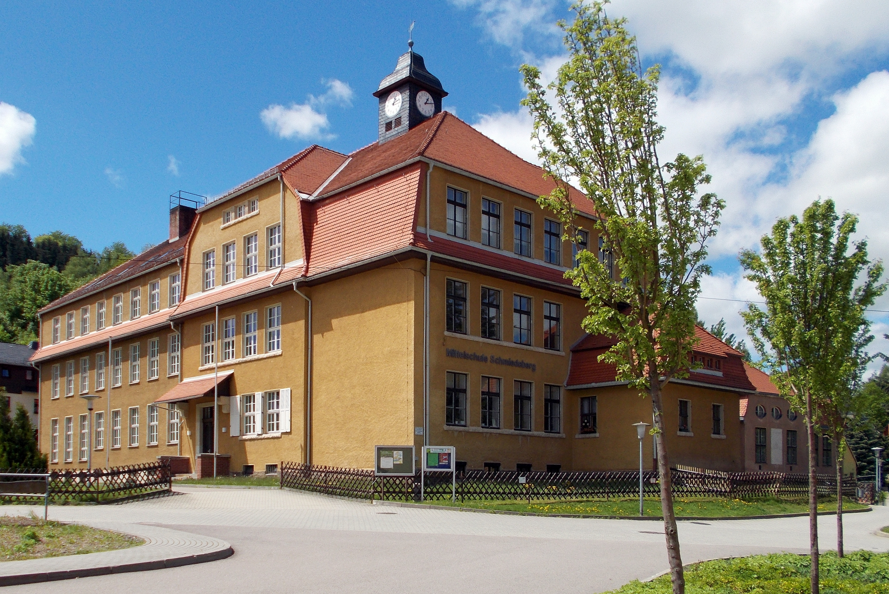 Mittelschule in Schmiedeberg